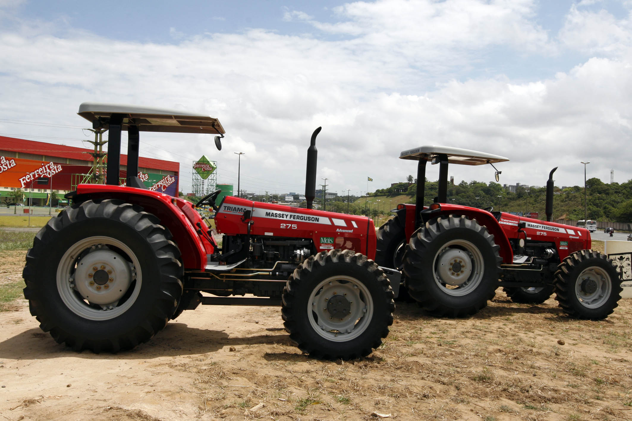 Tratores Massey Ferguson, Bahia, Brasil.